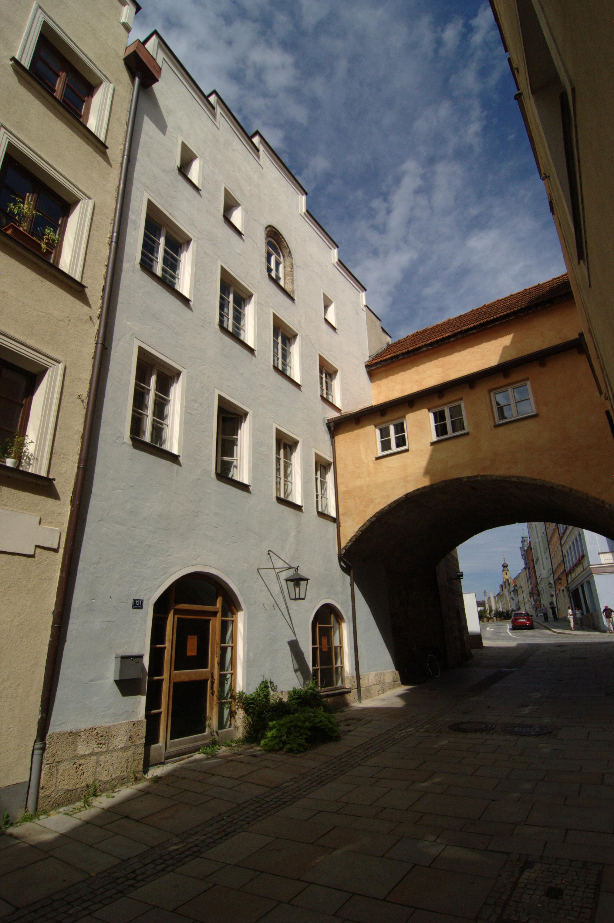 Ehemaliges HandwerkerhausThis is a photograph of an architectural monument.